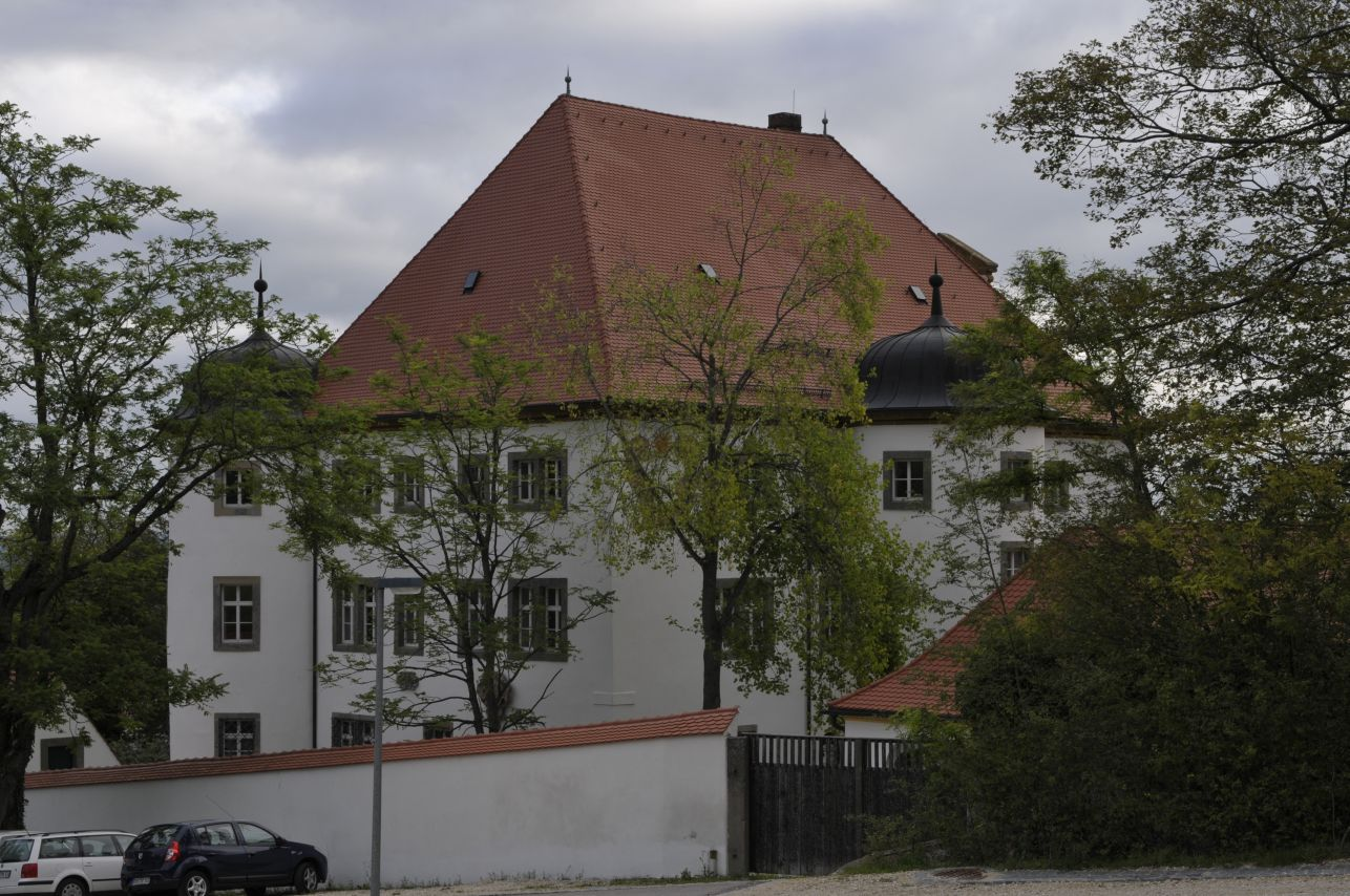 Ostfront des Schlosses